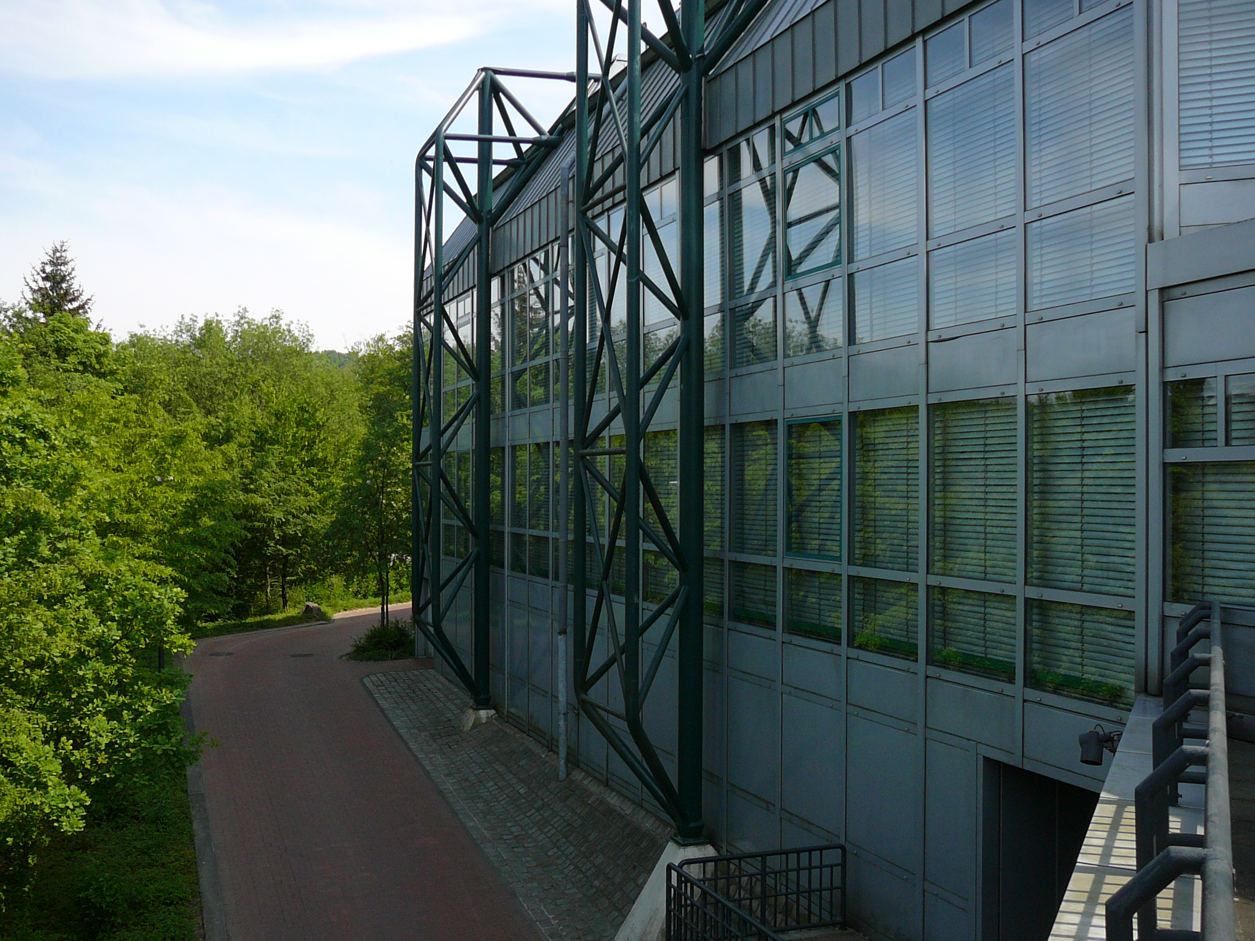 Wuppertaler Unihalle